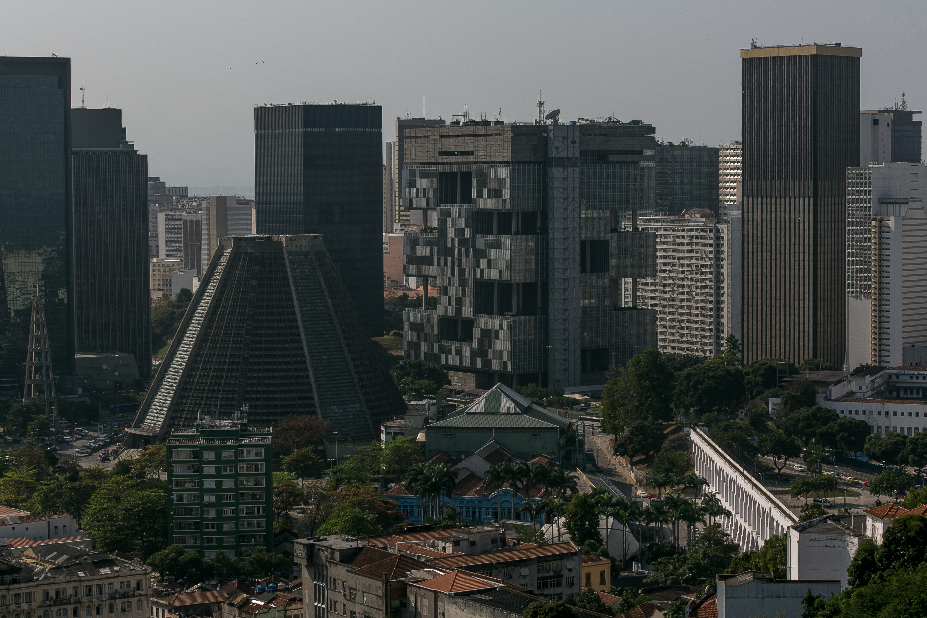 Vista para a Catedral Metropolitana e os Arcos da Lapa